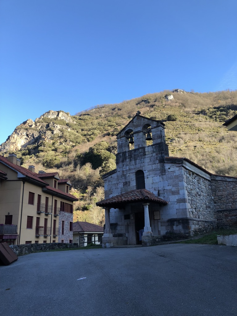 Iglesia de San Pedro de Pola de Somiedo, iglesia con elementos de la tradición constructiva regional. Fecha de construcción sobre la puerta (1731). Principado de Asturias.